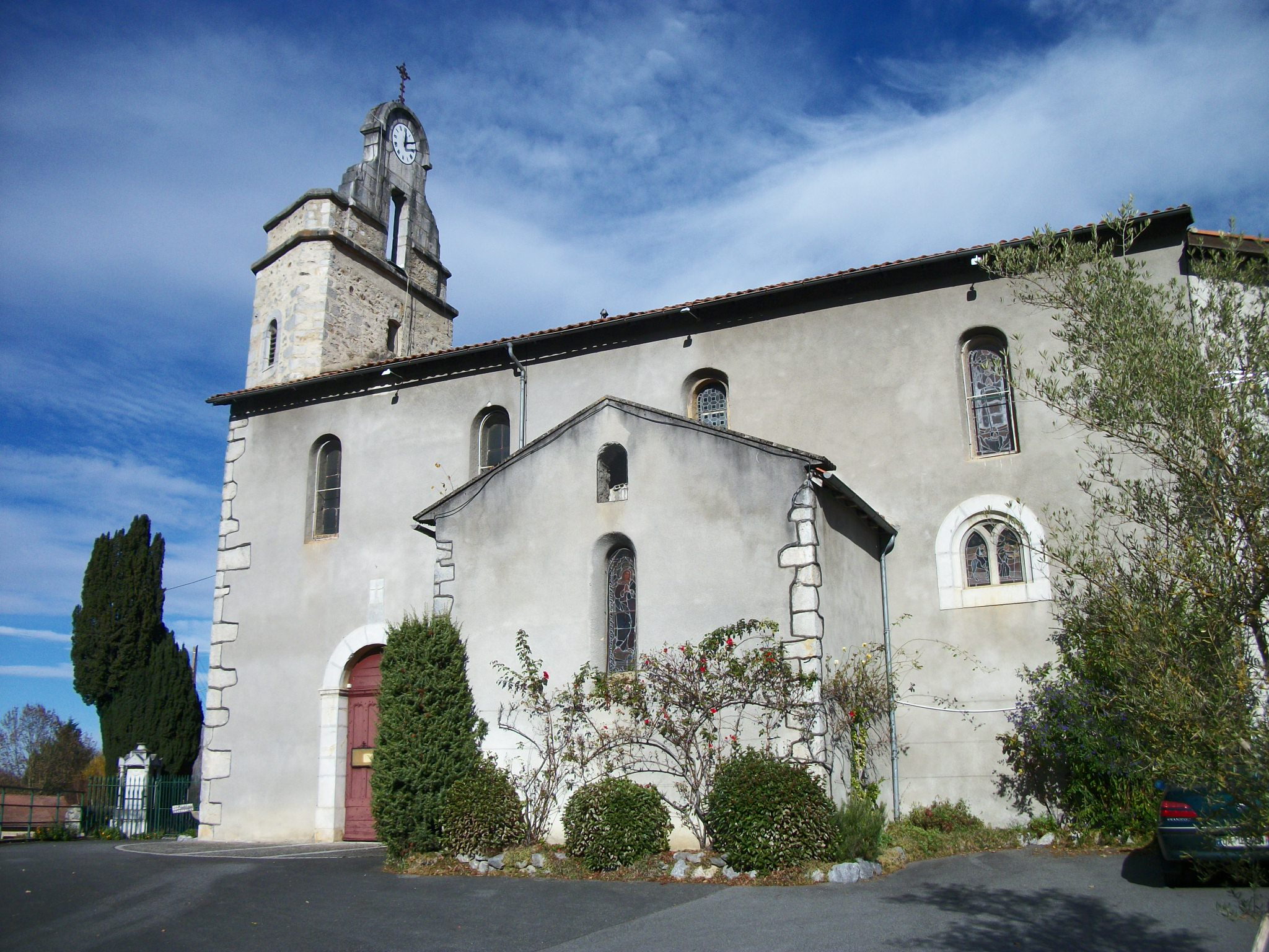 Église de Seilhan